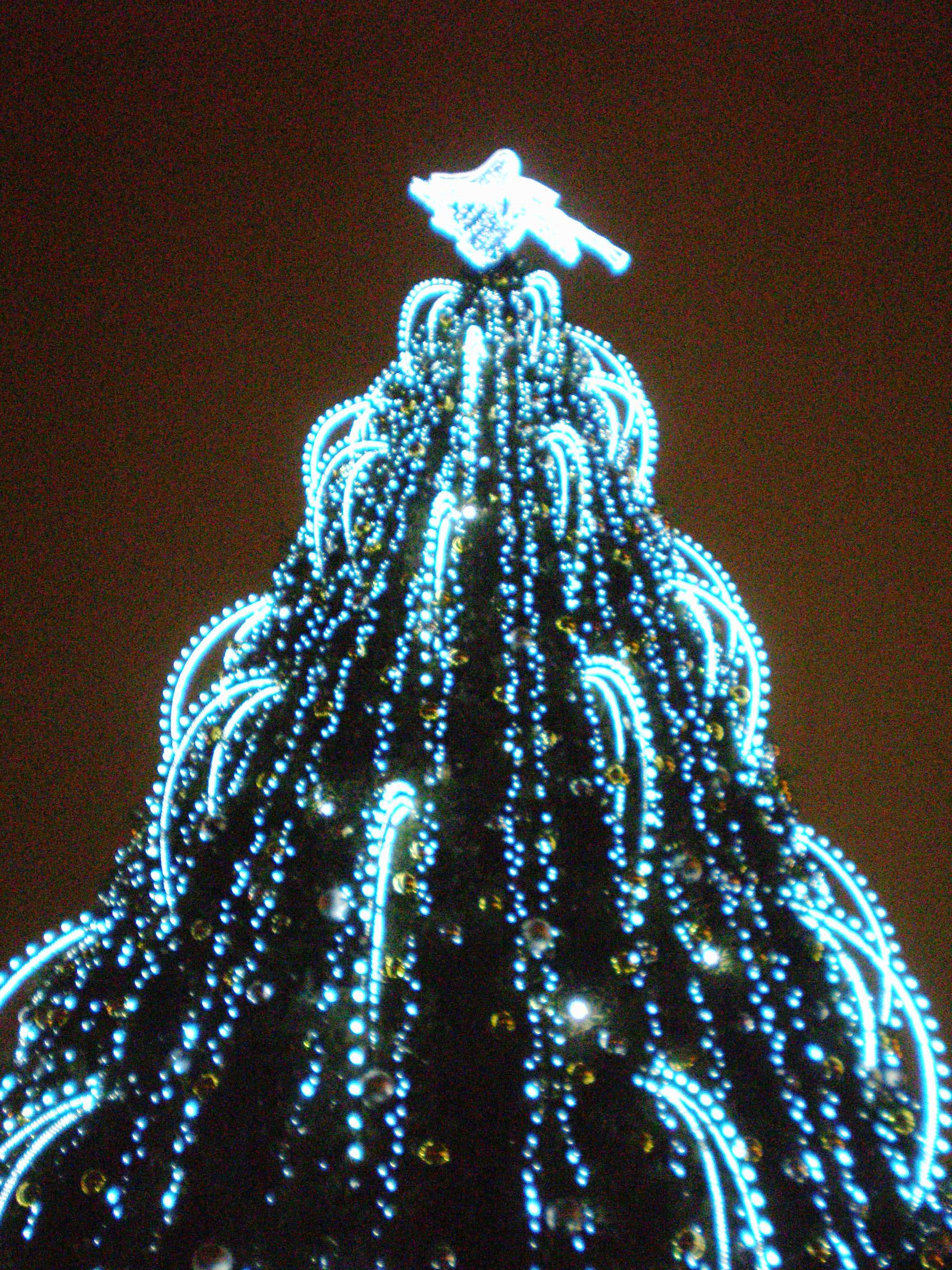 Árbol de Navidad en Plaza Catedral de Vilnius